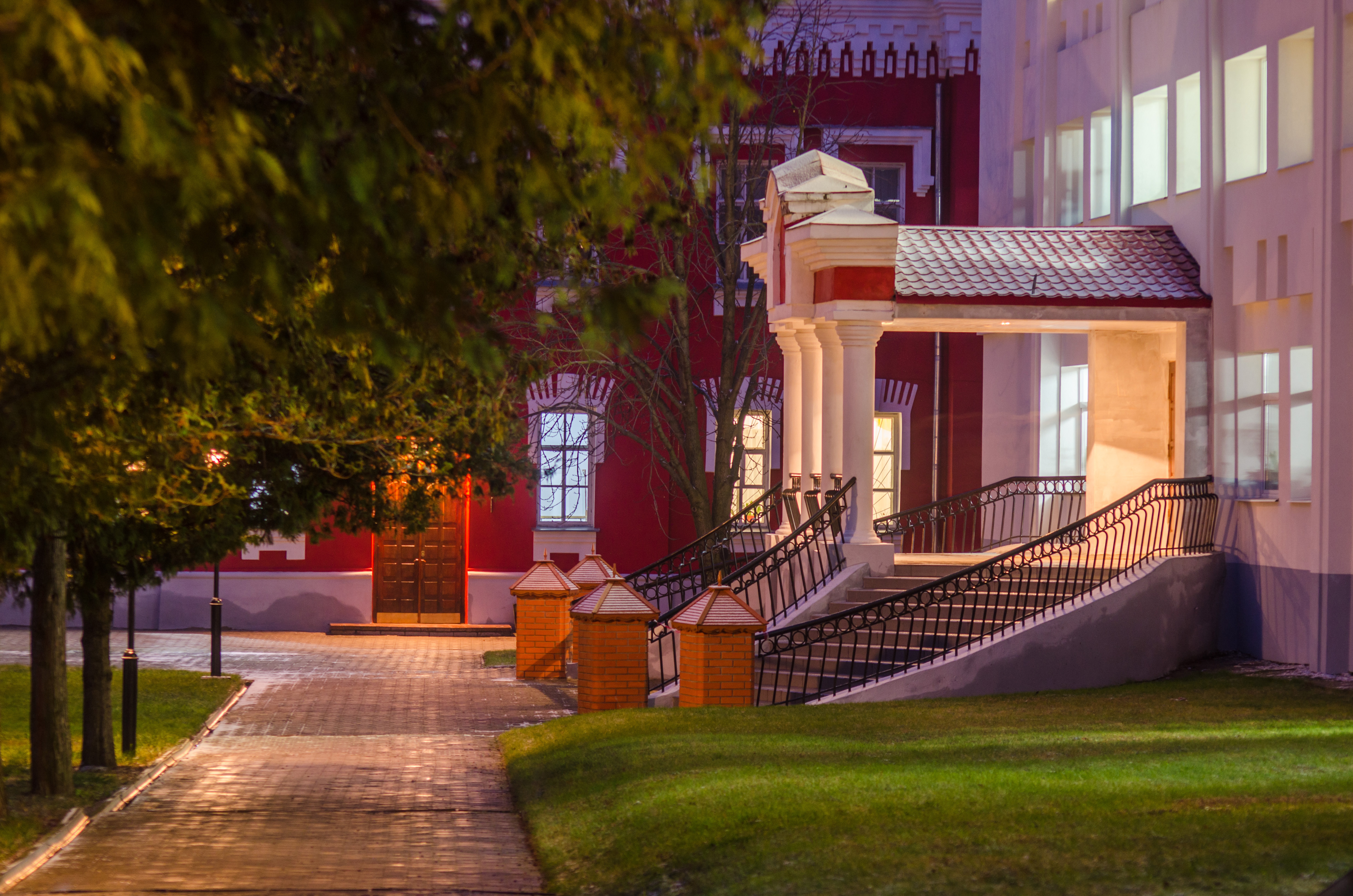 Гуманітарно-просвітницький комплекс, Глухів, вул. Києво-Московська, 24